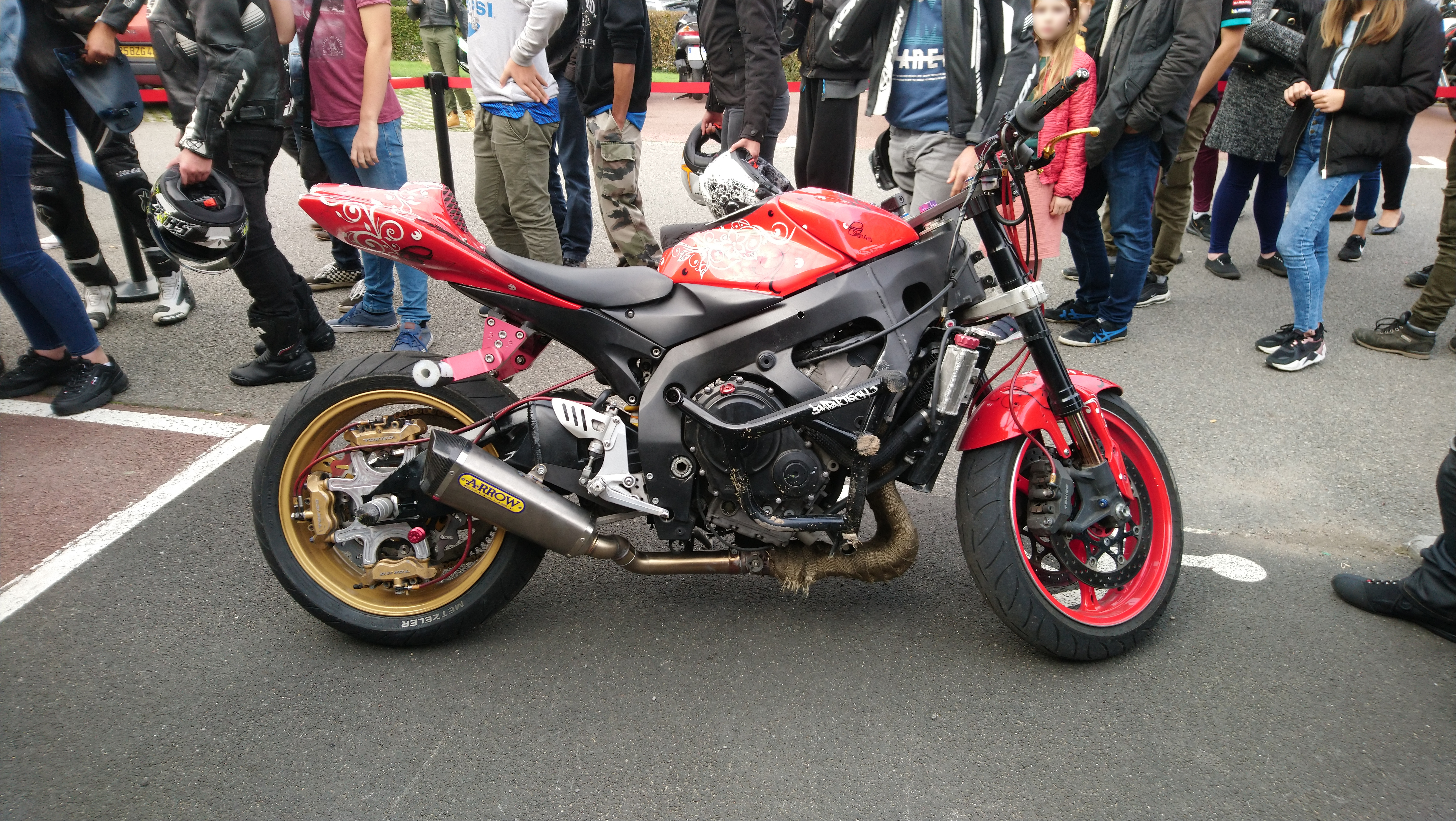 Suzuki GSXR 750 de Sarah Lezito, exhibition du 051019 au Village Moto de Nantes.